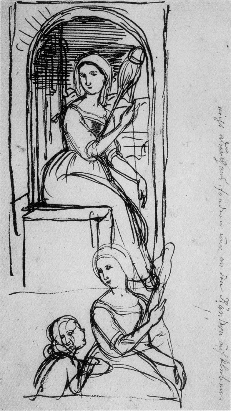 Studie zur Vittoria Caldoni, um 1822